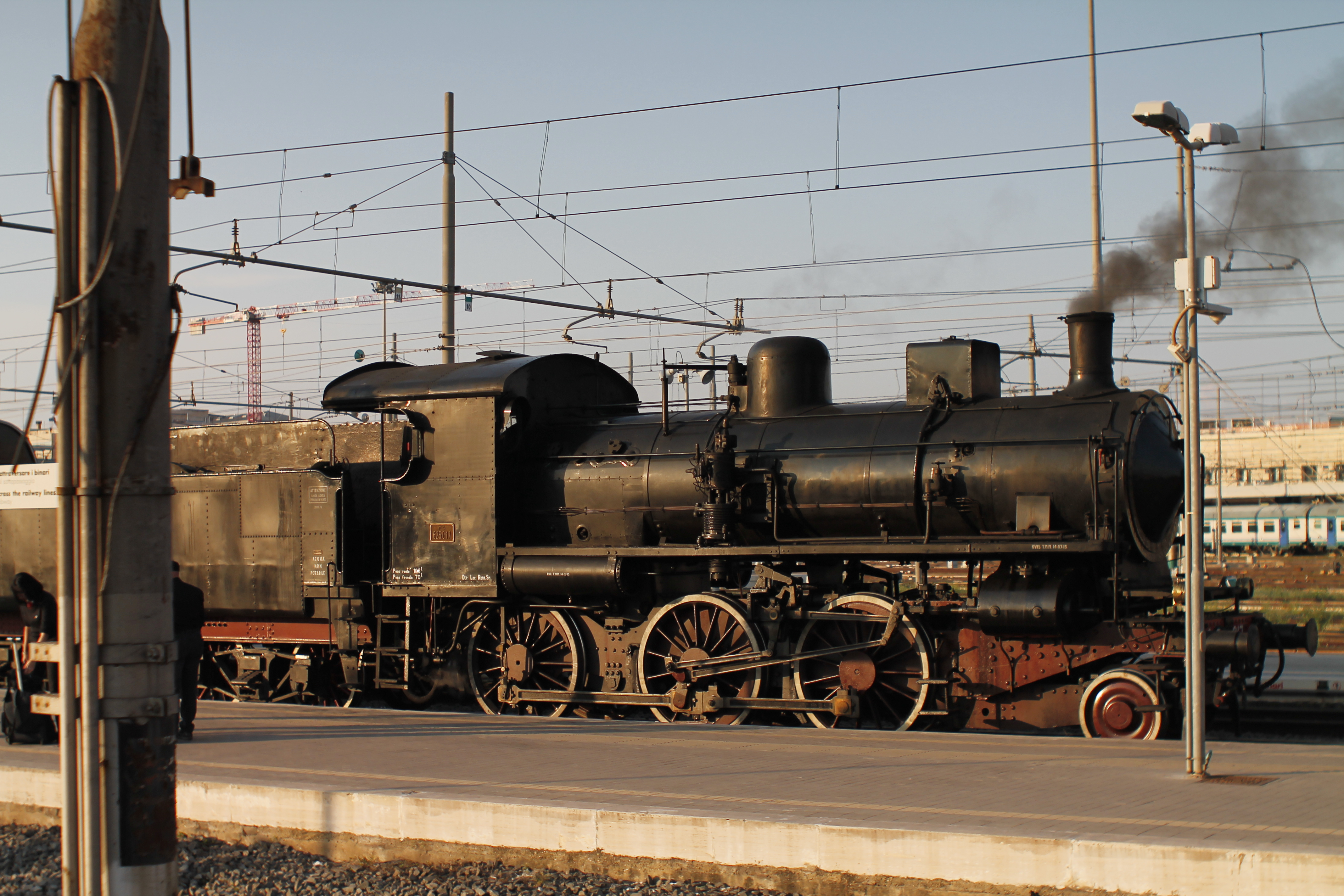 foto locomotiva fs 625.17 ferma a roma termini per la giornata del fai 14/10/2018